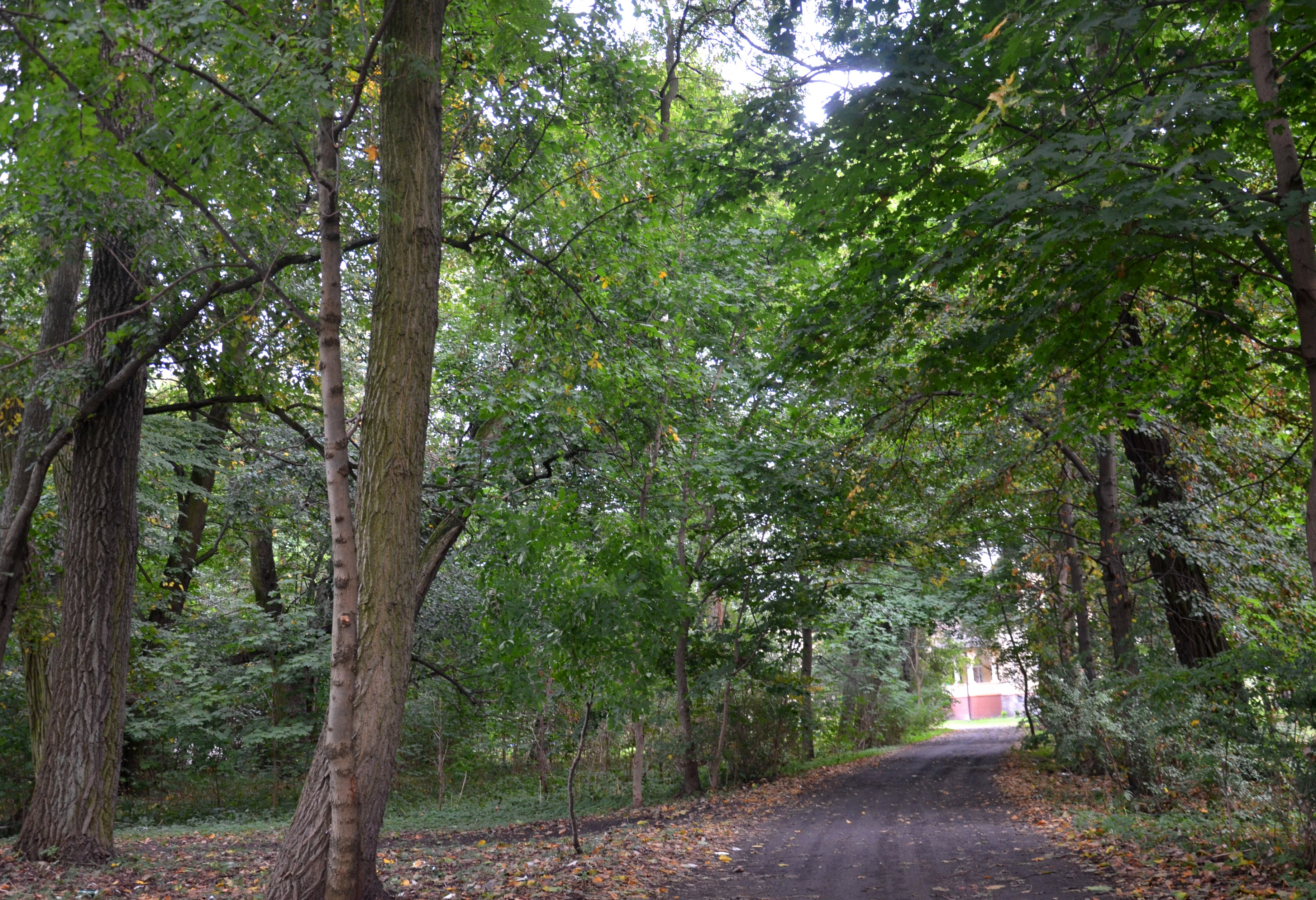 Ninino, park, XIX/XX